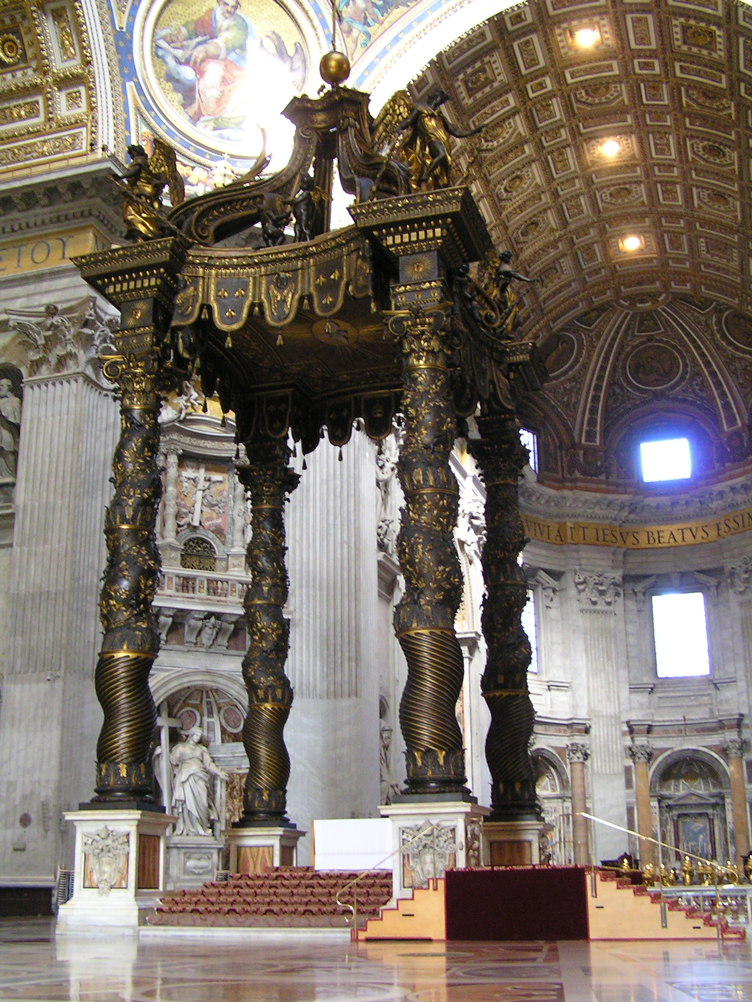 Ківорій_соб_Сб_Петра: Ківорій соб. Св. Петра в Римі